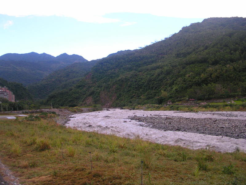 臺灣臺東縣知本溪。